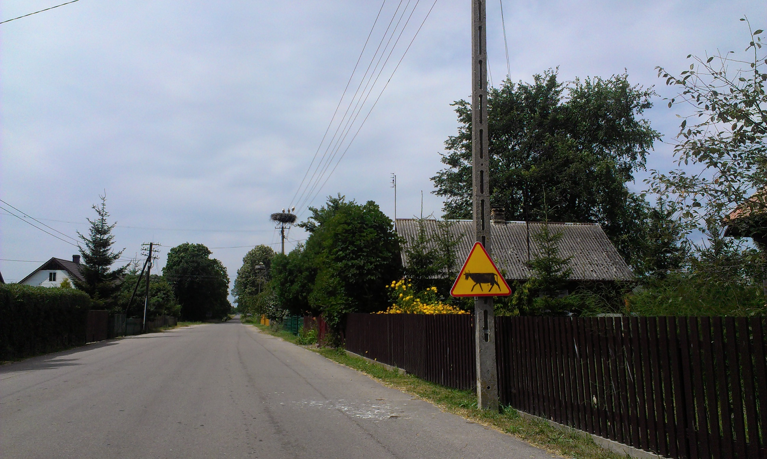 Gniazdo bociana białego znajdujące się we wsi Dubno